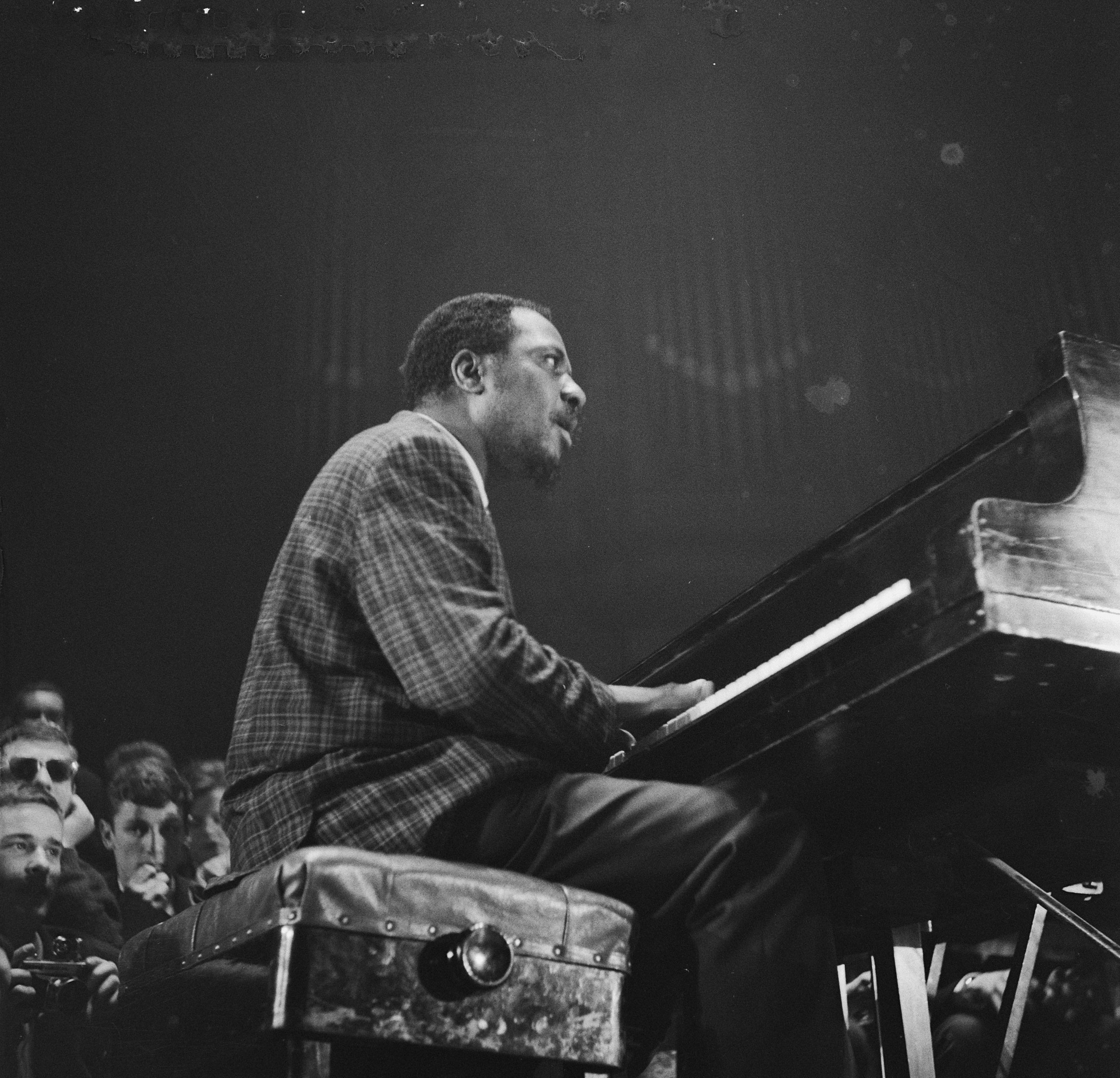 Collectie / Archief : Fotocollectie Anefo Reportage / Serie : [ onbekend ] Beschrijving : Nachtconcert van Thelonious Monk in het Concertgebouw Datum : 15 april 1961 Trefwoorden : CONCERTGEBOUWEN, Nachtconcerten Persoonsnaam : Monk, Thelonious Fotograaf : Fotograaf Onbekend / Anefo Auteursrechthebbende : Nationaal Archief Materiaalsoort : Negatief (zwart/wit) Nummer archiefinventaris : bekijk toegang 2.24.01.03 Bestanddeelnummer : 912-3529